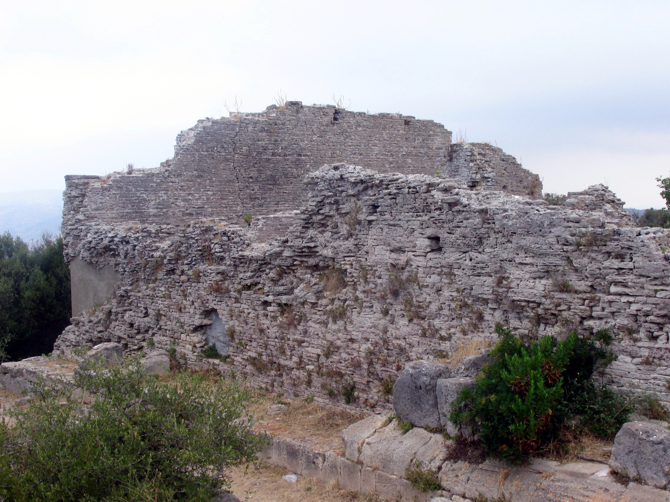 Tempio Capitolino a Cosa, Ansedonia, Orbetello, Toscana, Italia